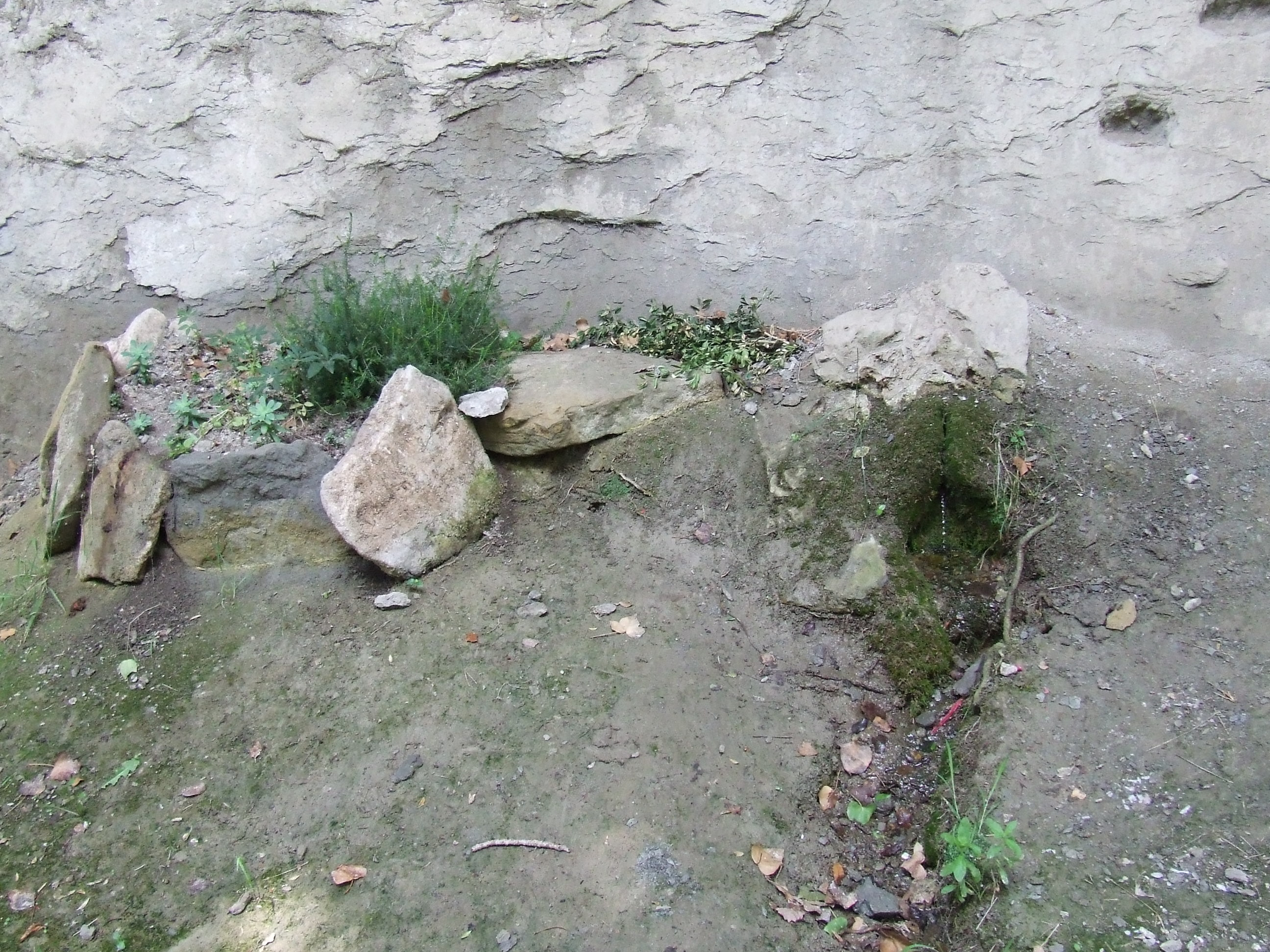 La font de Fontscalents (Castellcir, Moianès)